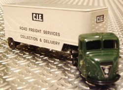 Corgi "Trackside" modelauto van een Scammell Scarab.